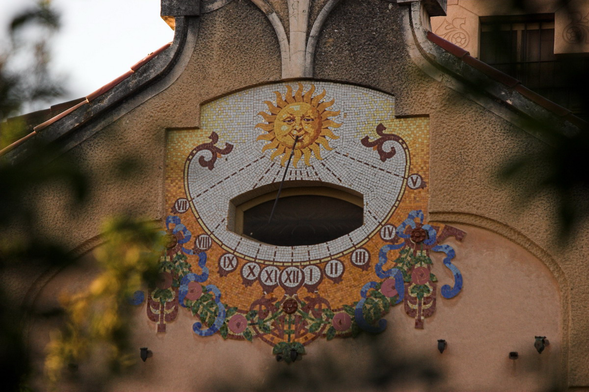 Casa Juli Barber i Poinsard (la Garriga-Vallès Oriental-Catalunya), obra de Manuel Raspall 1910. Rellotge de sol.